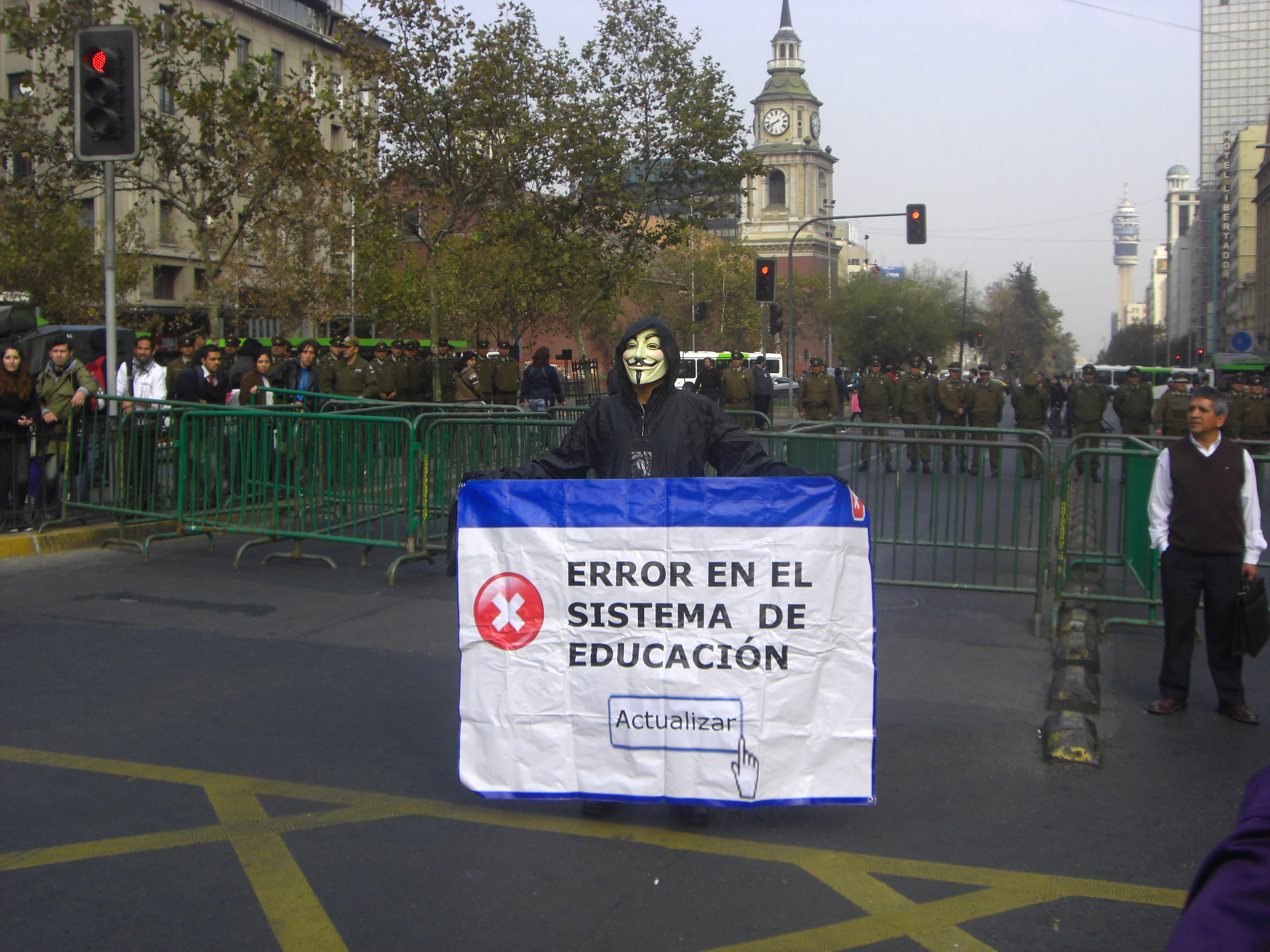 Un manifestante porta una pancarta durante la marcha del 25 de Abril, en Santiago.